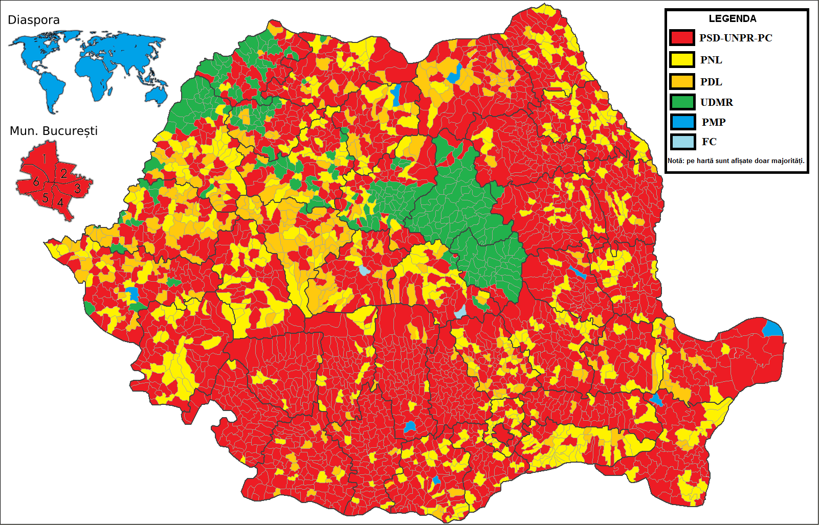 Rezultatul Alegerilor pentru Parlamentul European din 2014, fiecare comună fiind colorată în culoarea partidului câștigător.